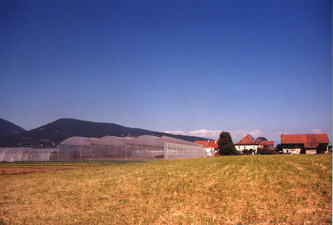 Photo de la commune d'Arthaz Pont Notre dame